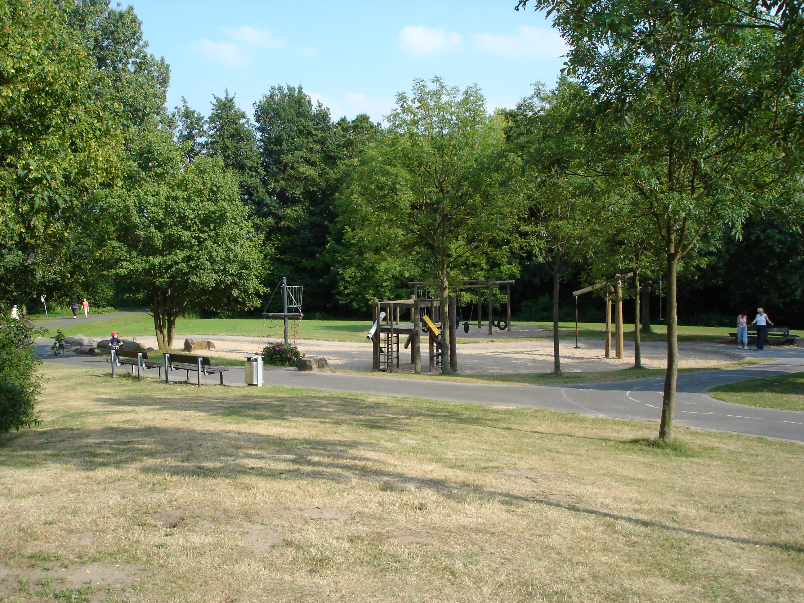 Spielplatz im Wienburgpark in Münster, Westfalen, Germany